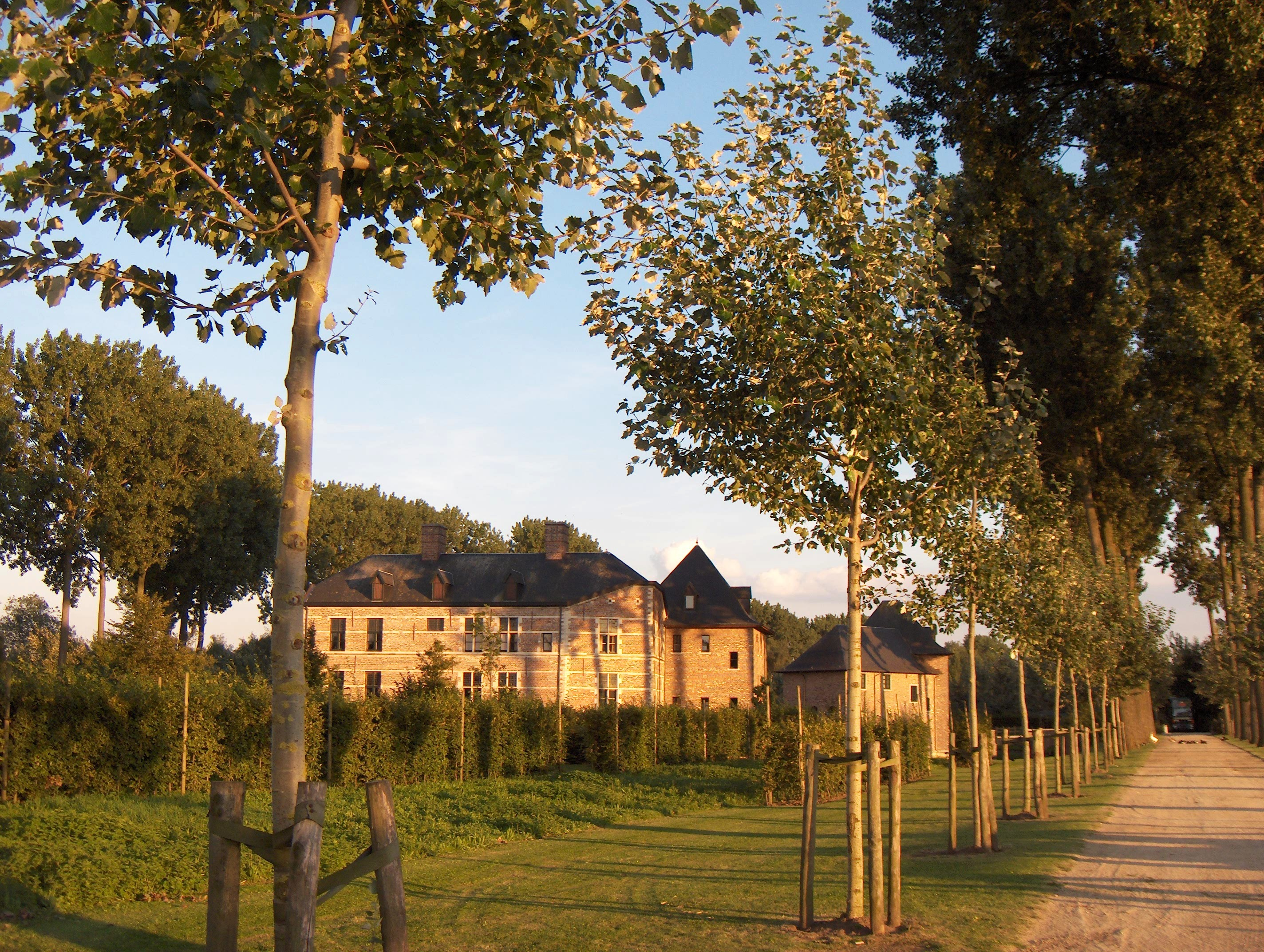 Schloss Diepensteyn zu Londerzeel, Ortsteil Steenhuffel (Belgien, Prov. Flämisch Brabant). 16. Jh. (mit älterer Geschichte), 1989 erwarb die Brauerei Palm die Ruine und restaurierte/rekonstruierte das Schloss.